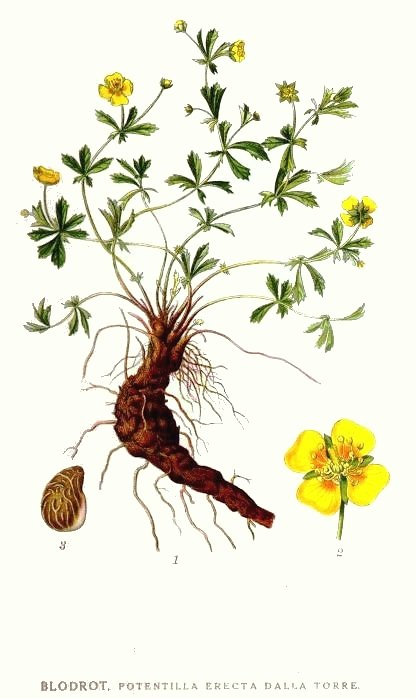 Potentilla erecta (L.) Räusch. Original Description Blodrot, Potentilla erecta Dalla Torre.